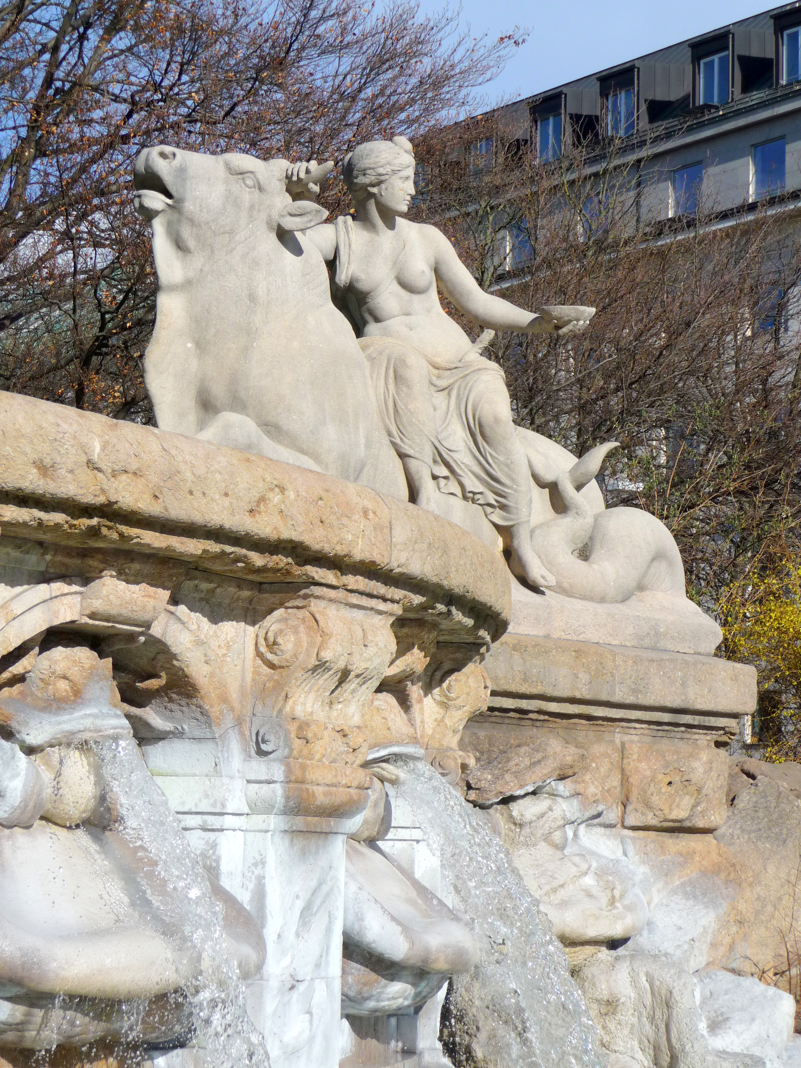 Wittelsbacher Brunnen in München. Detail: Allegorie der segensreichen Kraft des Wassers. 1893–1895